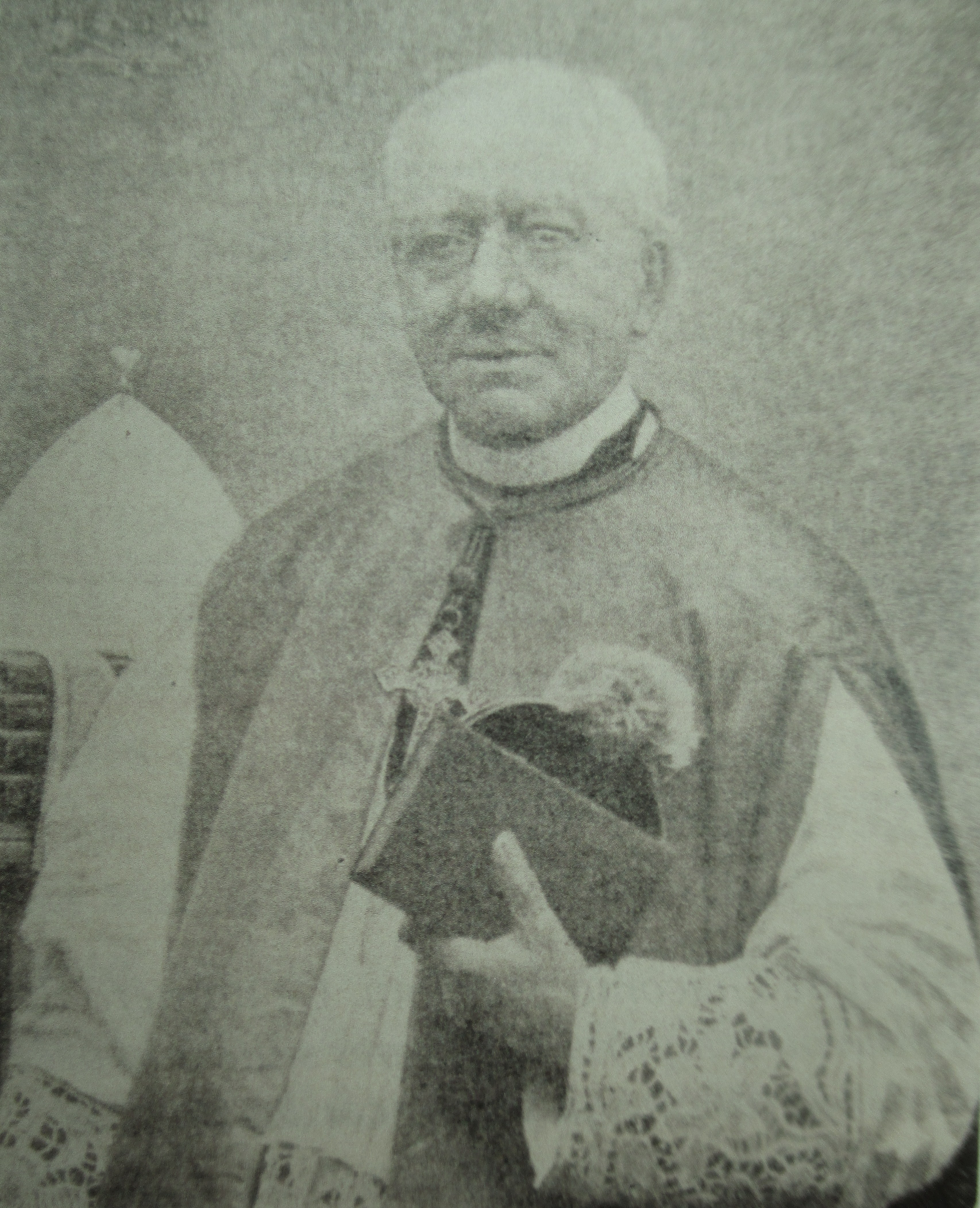 Mgr Delassus (1836-1921).